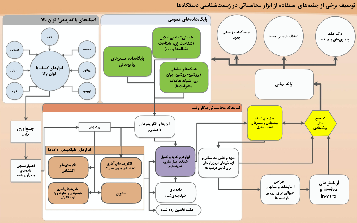 فرآیند زیست‌شناسی دستگاه‌ها از ابزارهای HT تا روشن شدن شبکه بیولوژیکی شروع می‌شود. نتایج ابزارهای کشف HT جمع‌آوری شده و اعتبارسنجی می‌شود. داده‌ها سپس در معرض آنالیز محاسباتی قرار می‌گیرند؛ ابتدا پیش پردازش شده و به کمک الگوریتم‌های مختلف، طبقه‌بندی می‌شوند. این الگوریتم‌ها شامل الگوریتم‌های آماری و اکتشافی تحت نظارت، نیمه نظارتی و بدون نظارت هستند. الگوریتم‌های مبتنی بر دانش و نظارتی یا نیمه نظارتی دارای اطلاعاتی هستند که از داده‌های عمومی گرفته شده‌است و شامل هستی‌شناسی، پیام‌رسانی و شبکه‌های تعاملی هستند. اطلاعات این پایگاه داده‌ها که از طریق ابزار و نرم‌افزار مناسب داده کاوی بدست آمده‌اند، به الگوریتم‌ها داده می‌شوند. این الگوریتم‌ها، داده‌ها را با دقت تخمین زده شده‌ای، طبقه‌بندی می‌کنند. سپس به ابزارهای تجزیه و تحلیل شبکه، مدل‌سازی، شبیه‌سازی داده می‌شوند. این ابزارها همچنین از پایگاه داده‌های عمومی که از تکنیک‌های داده کاوی و همچنین از الگوریتم‌های ذکر شده قبلی استفاده می‌کنند، داده می‌گیرند. خروجی این ابزارها مدلی است که روی آن آنالیز محاسباتی، مدل‌سازی درون رایانه ای و شبیه‌سازی برای اصلاح و بررسی فرضیه‌ها صورت می‌گیرد. این شبیه‌سازی‌ها و مدل‌ها، شبکه پیشنهادی را اصلاح کرده و آزمایش‌های متناسبی در یک مدل حیوان یا سلولهای انسانی طراحی می‌کند. آزمایش‌های in vivo و in vitro برای ارزیابی فرضیه‌ها و پیش‌بینی‌های شبکه مدل شده انجام شده و امکان اصلاح شبکه را نیز فراهم می‌کند. پس از جمع‌آوری شواهد کافی از آزمایش‌ها و تست فرضیه‌ها، نسخه‌ای نهایی از سیستم ارائه می‌شود که می‌تواند یک بیماری را شرح دهد. این نسخه امکان ایجاد نشانگرهای زیستی و کشف درمان‌های جدید را فراهم کرده، درکی از فیزیولوژی طبیعی ارائه داده و می‌تواند در به روز رسانی پایگاه داده‌های آنلاین کمک کند.